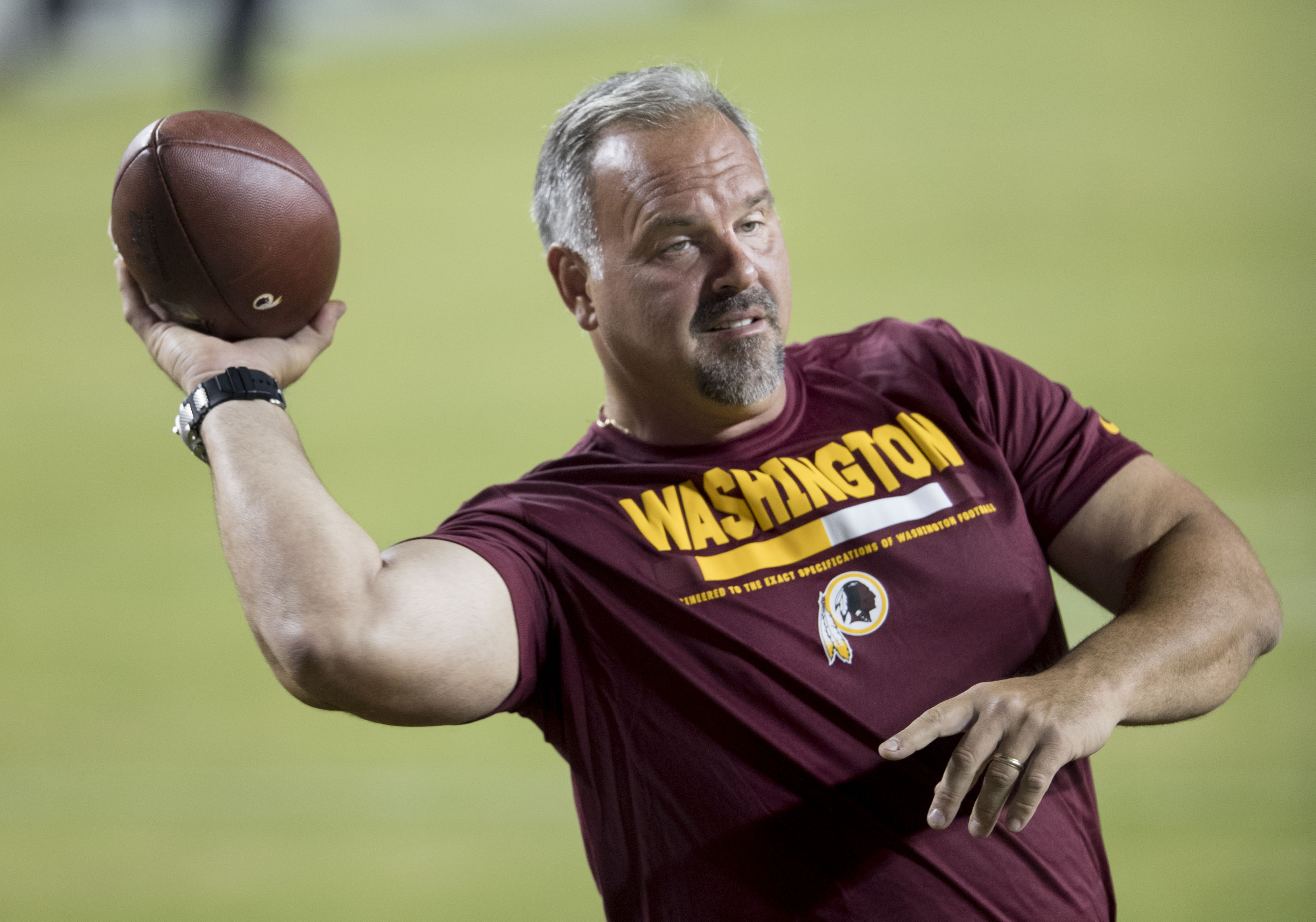 Raiders at Redskins 9/24/17